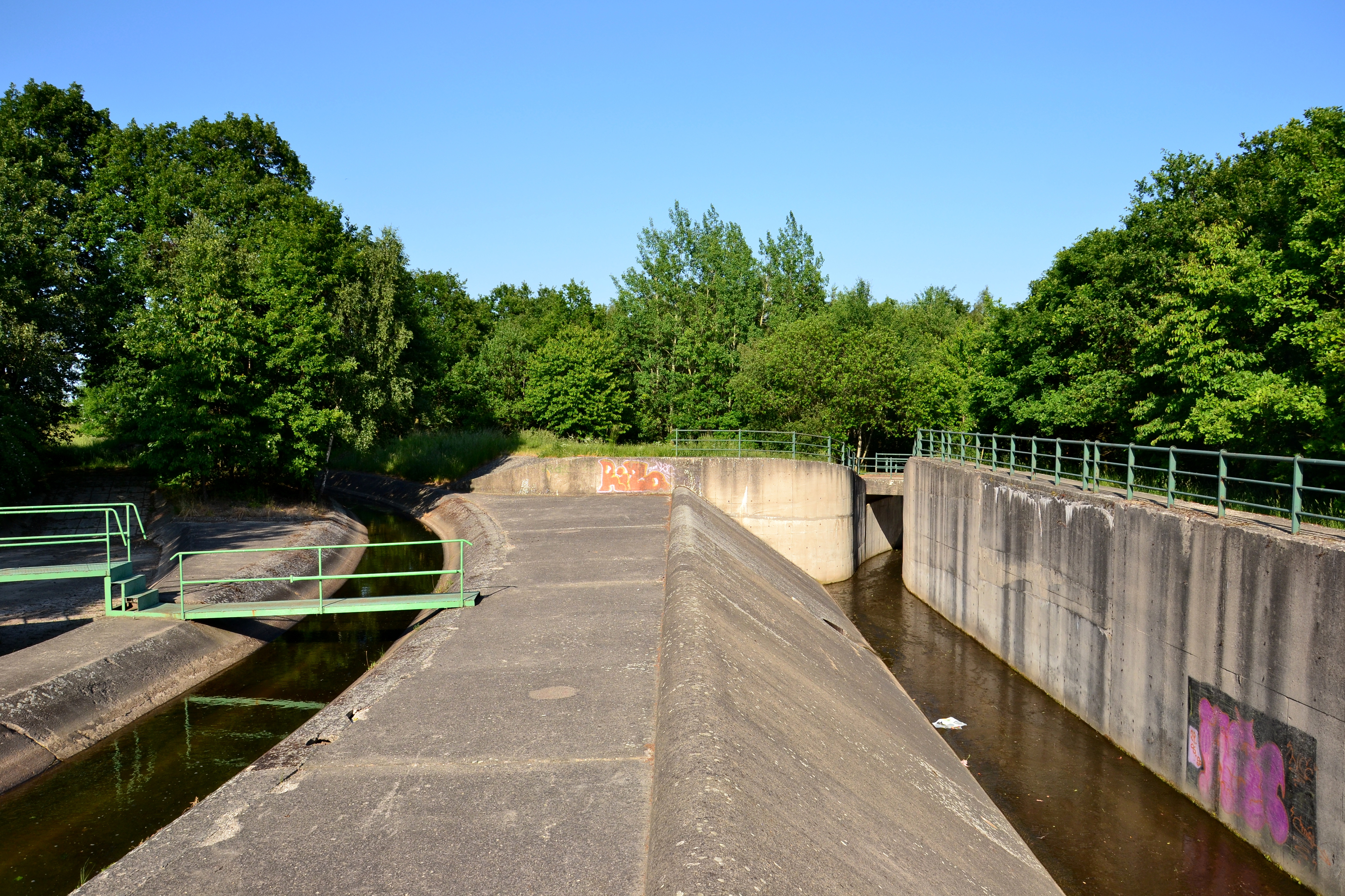 Spořice – shybka nad Hačkou na přivaděči Ohře–Bílina